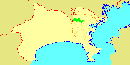 Map of Midori-ku, Yokohama, Kanagawa-prefecture, Japan